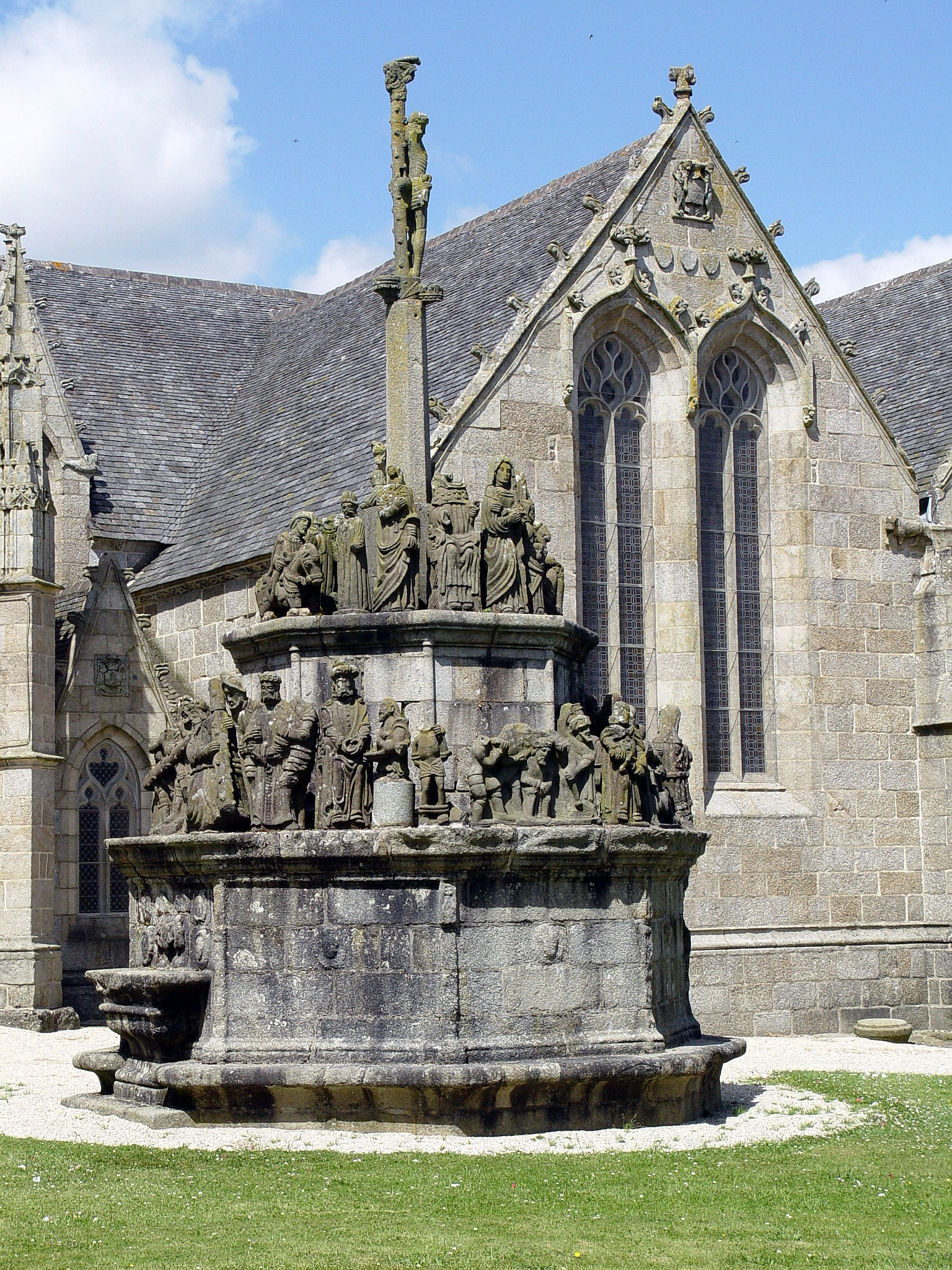 Monumentaler Kalvarienberg in Kergrist Moelou (Bretagne-Cotes d'Armor)